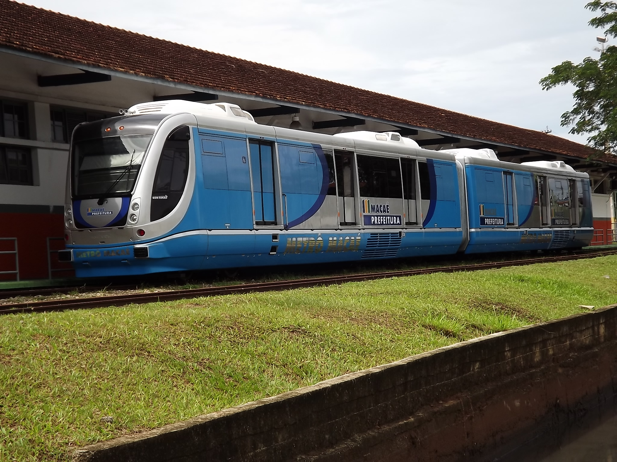 TUDH modelo Mobile 2 fabricado pela Bom Sinal na cidade de Barbalha (Ceará) a ser utilizado no futuro projeto do VLT de Macaé-RJ, atualmente encontra-se estacionado na Estação Ferroviária de Macaé sem utilização.